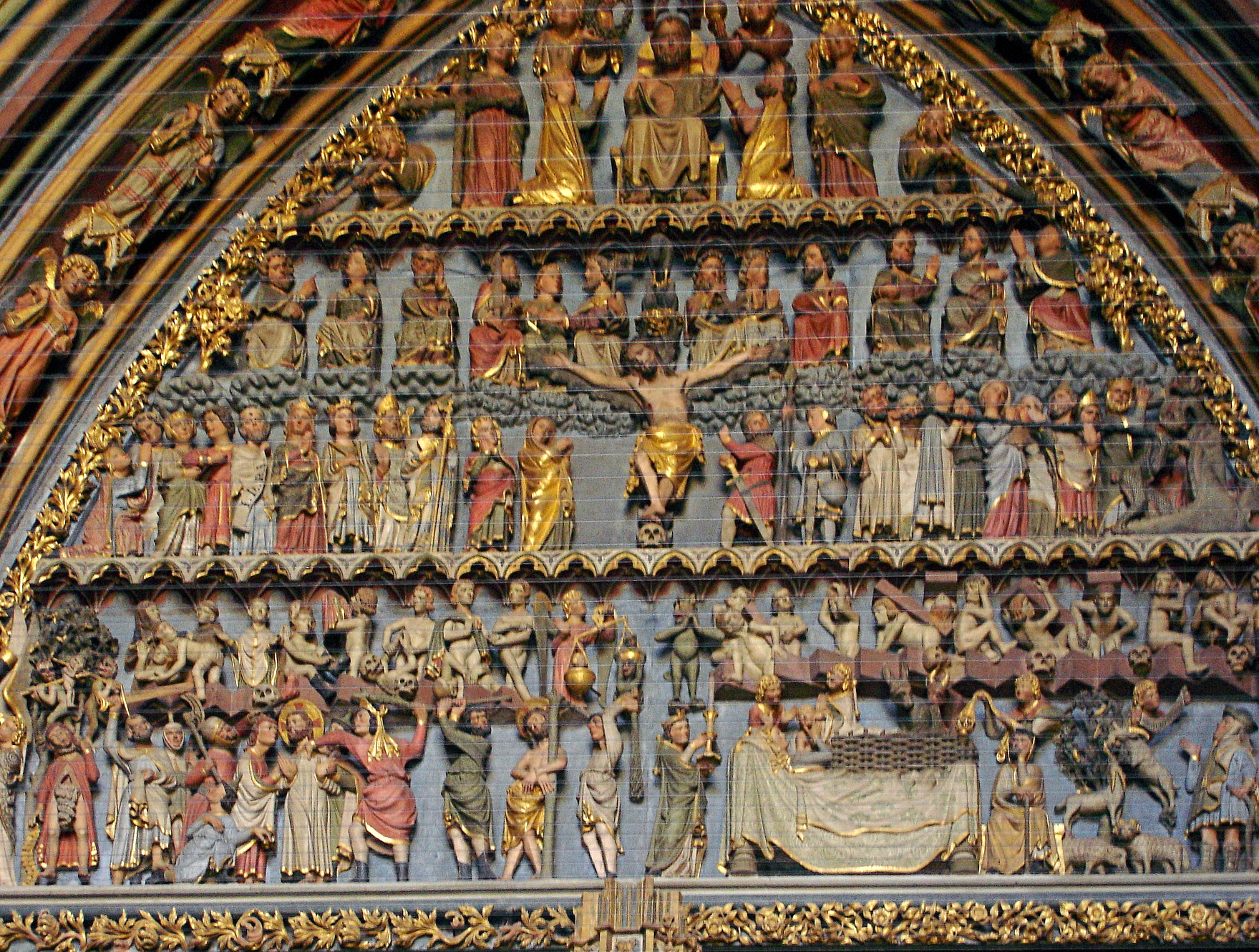 tympanon Freiburger Münster mit farbiger Fassung nach Restaurierung. Streifen davor sind vom Schutznetz